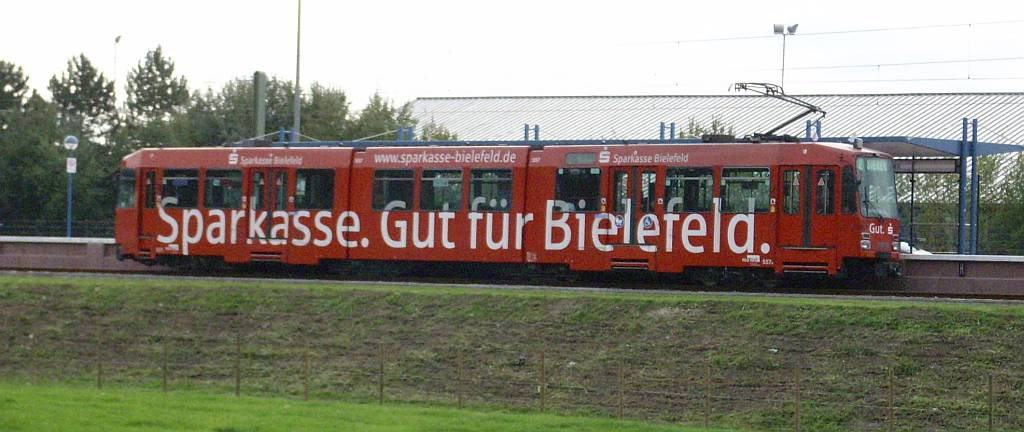 Tramwaj Duewag M8C lini 2 na końcowym przystanku Milse w Bielefeldzie.